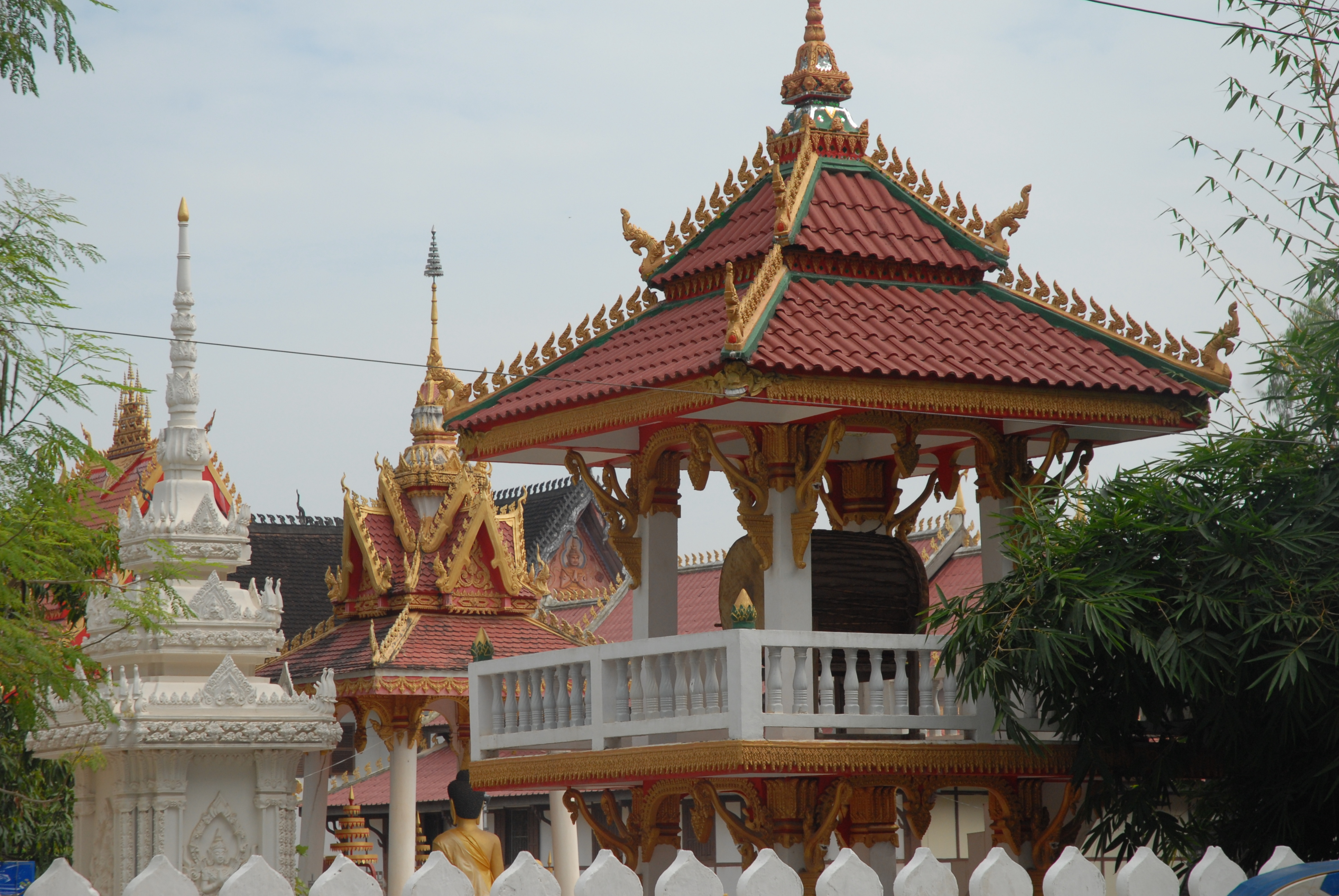 Pagode Vat Sisakhet à Vientiane : pavillons annexes et stupa